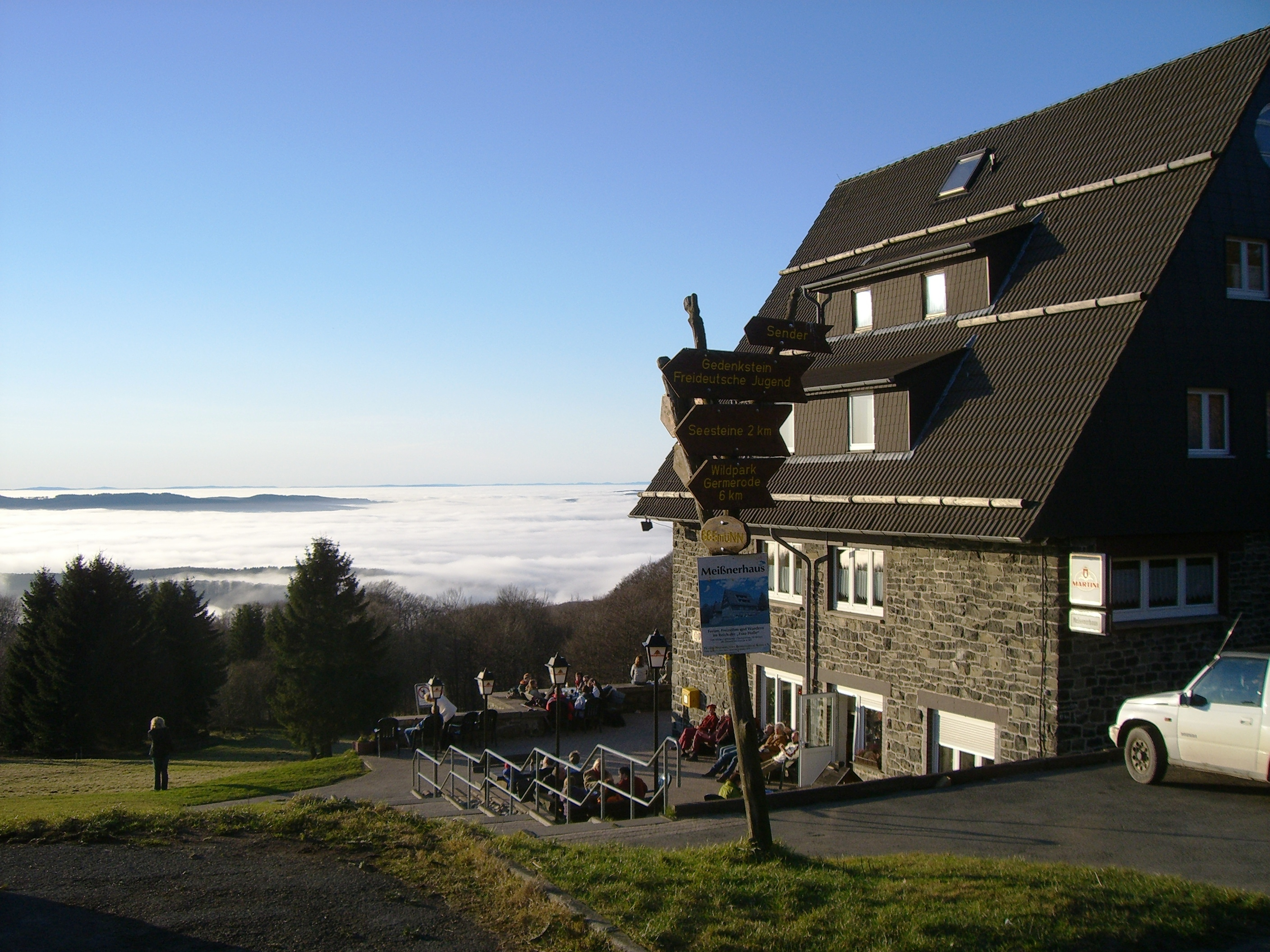 Blick vom Meißnerhaus in Richtung Hess. Lichtenau am Heiligabend 2006. Während weite Teile Nordhessens unter einer dichten Nebeldecke liegen, herrscht auf dem Hohen Meißner bei Temperaturen um 9° Celsius eine herrliche Sicht auf die Kuppen der nordhessischen und thüringischen Berge.